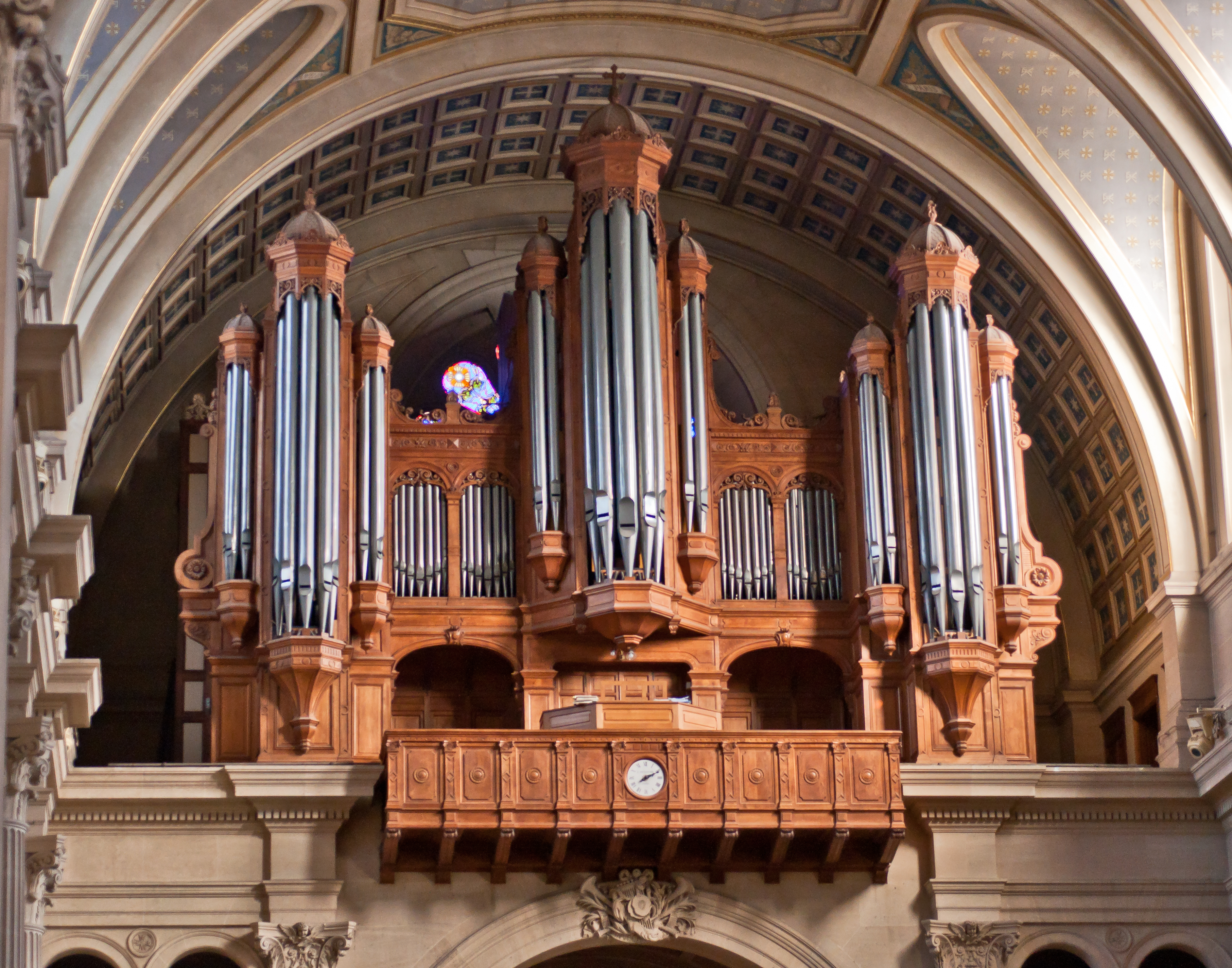 Orgue de tribune de l'église Saint François-Xavier à Paris.